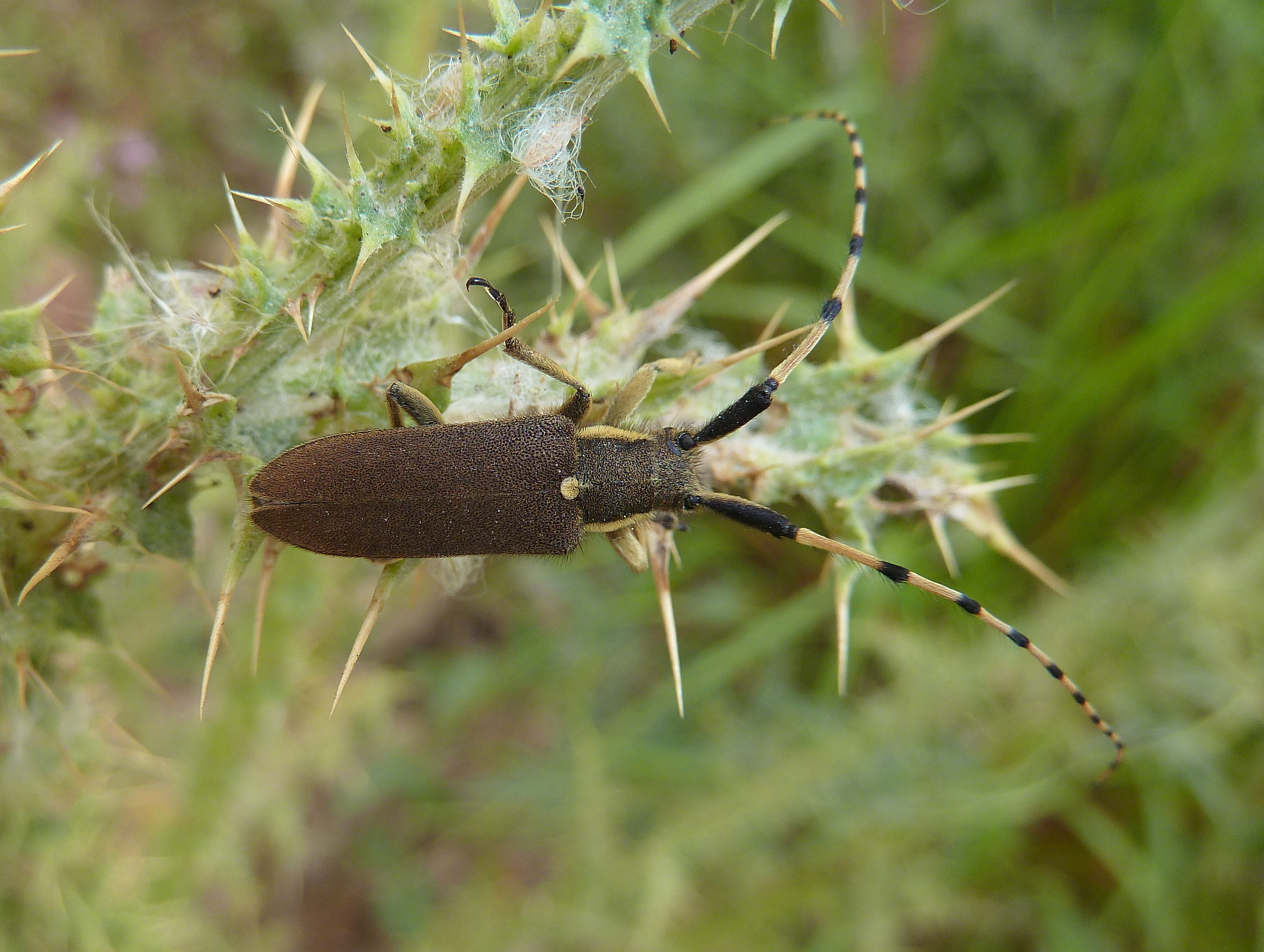 Agapanthia annularis (Olivier, 1795) sobre Carduus bourgeanus - Poligono Industrial 'La Granadilla', Albatera (Alicante, España)